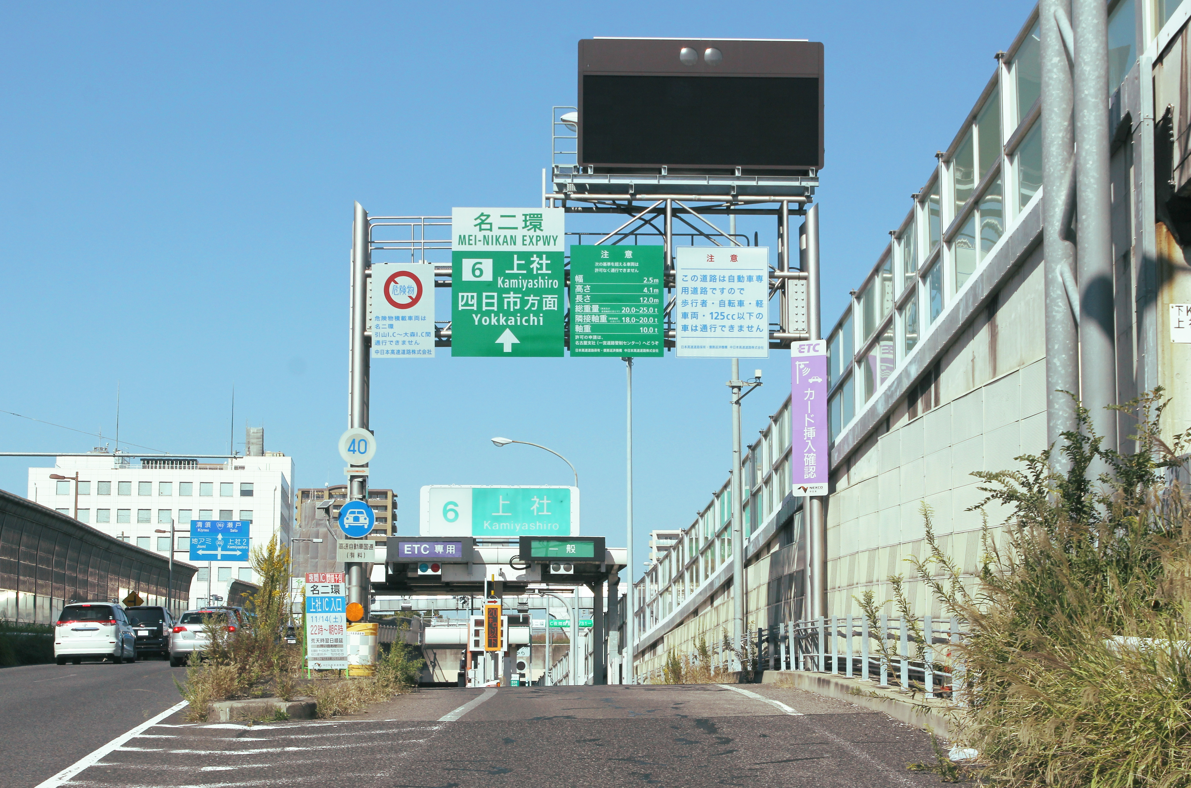 名二環 上社IC